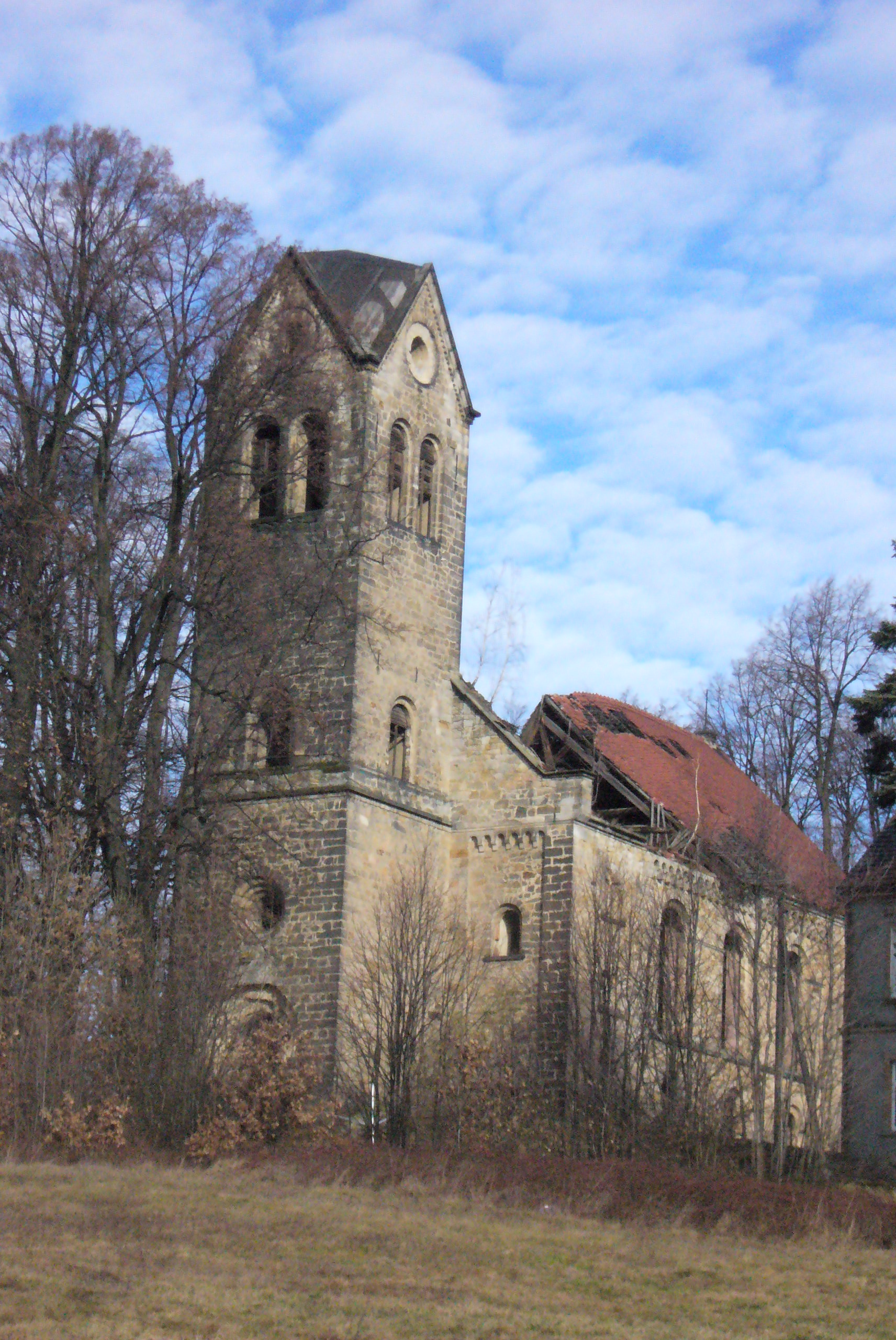 Stare Jaroszowice - ruiny kościoła ewangelickiego